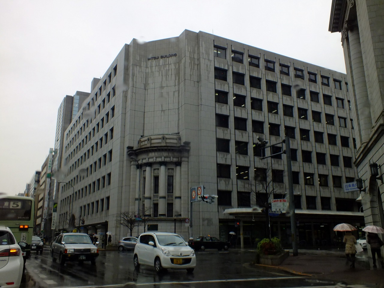 四条烏丸の北西角に立つ建物。1980年に取り壊しが始まったが、保存運動により入口部分が残された。四条通を挟んで南側には三菱東京UFJ銀行 京都中央支店（旧三菱銀行 京都支店）がある。